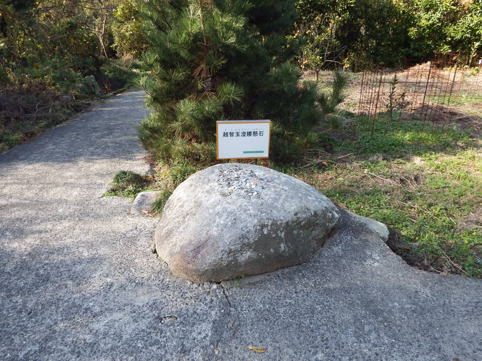 大三島 腰懸石